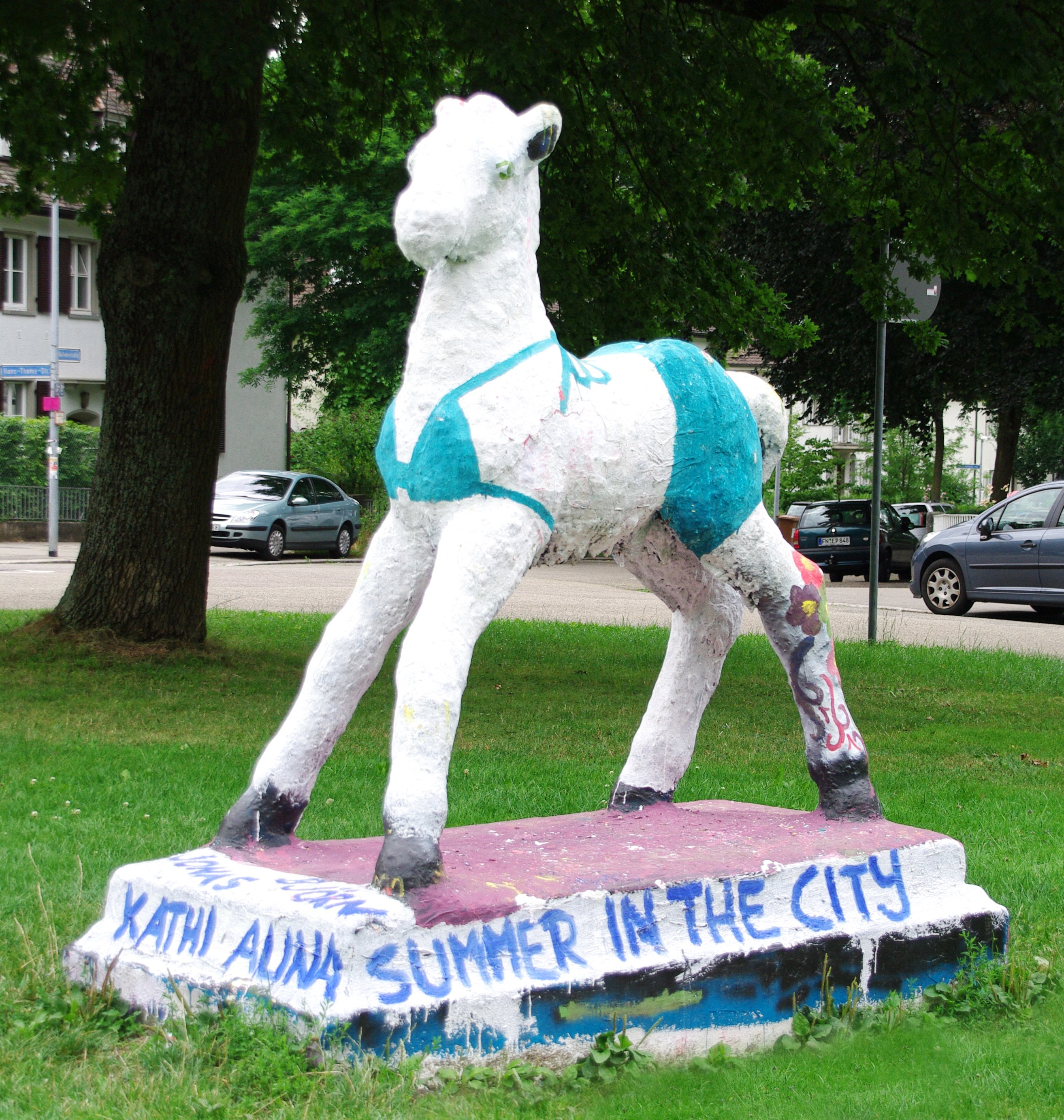 Das Holbeinpferdle am 26.07.2010